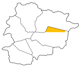 Localització del Terreny de Concòrdia a Andorra